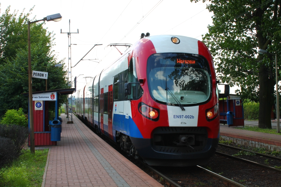 Elektryczny zespół trakcyjny EN97-002 stoi na przystanku Warszawa Salomea.